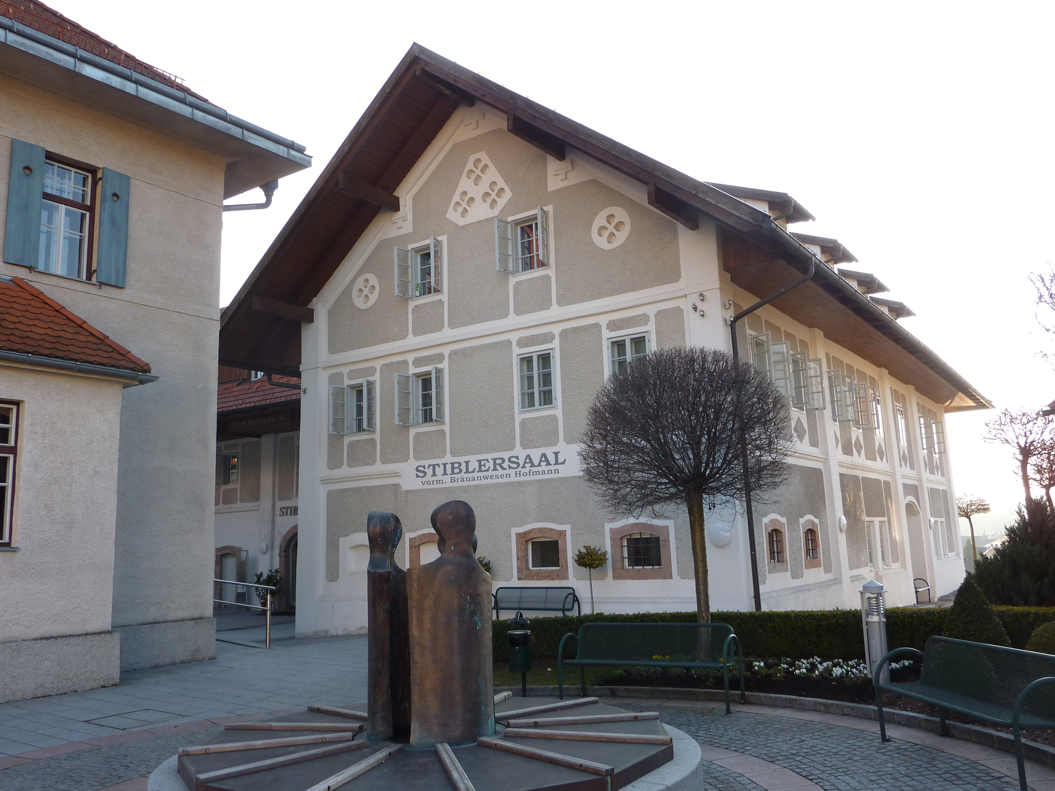 Stiblersaal, Ehemaliges Nebengebäude des Braugasthofes Hofmann, Aspach, Marktplatz 8, Oberösterreich